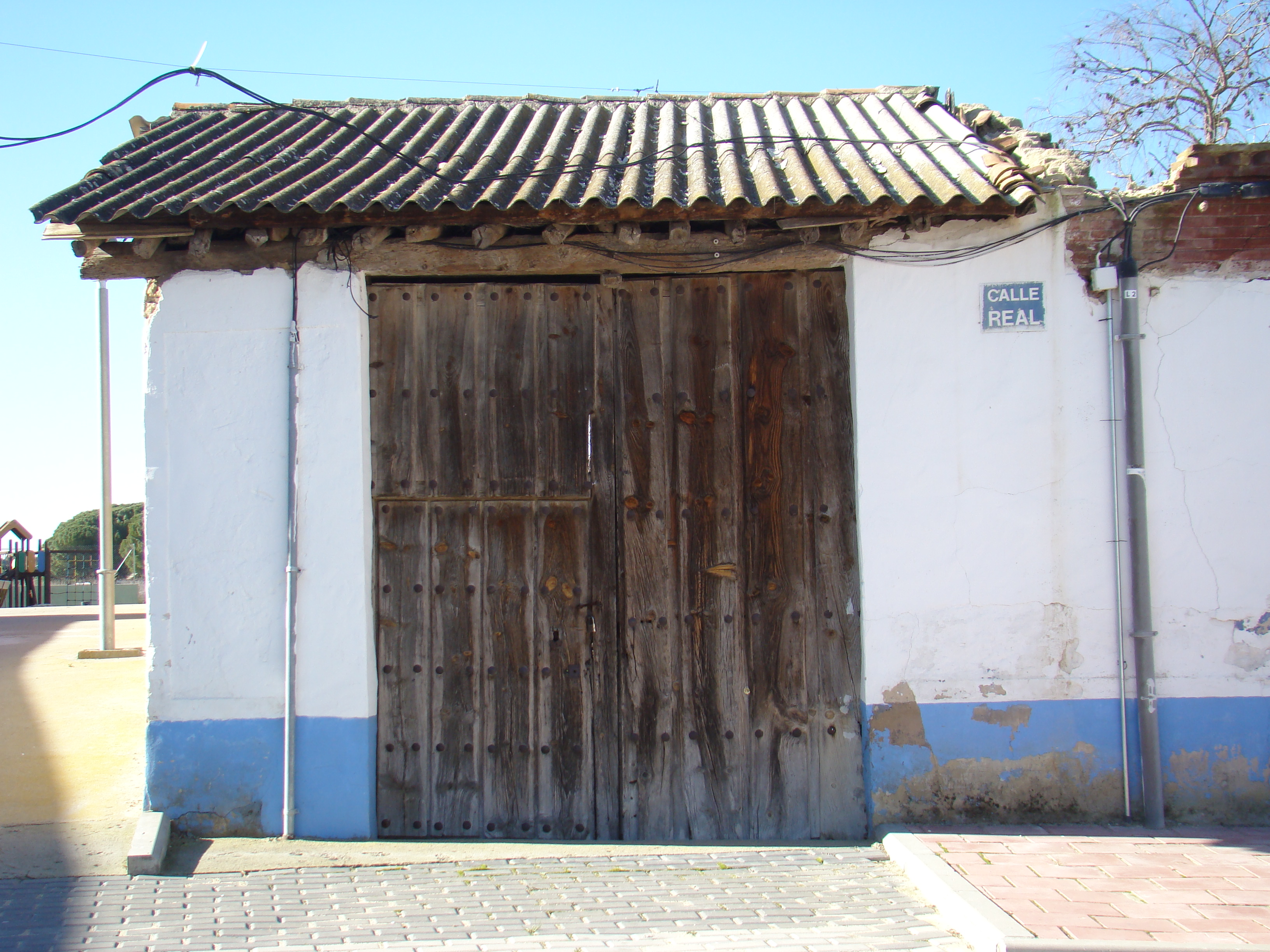 Moraleja de las Panaderas en la provincia de Valladolid, España. Calle Real, actual carretera. En la foto una construcción de arquitectura popular.